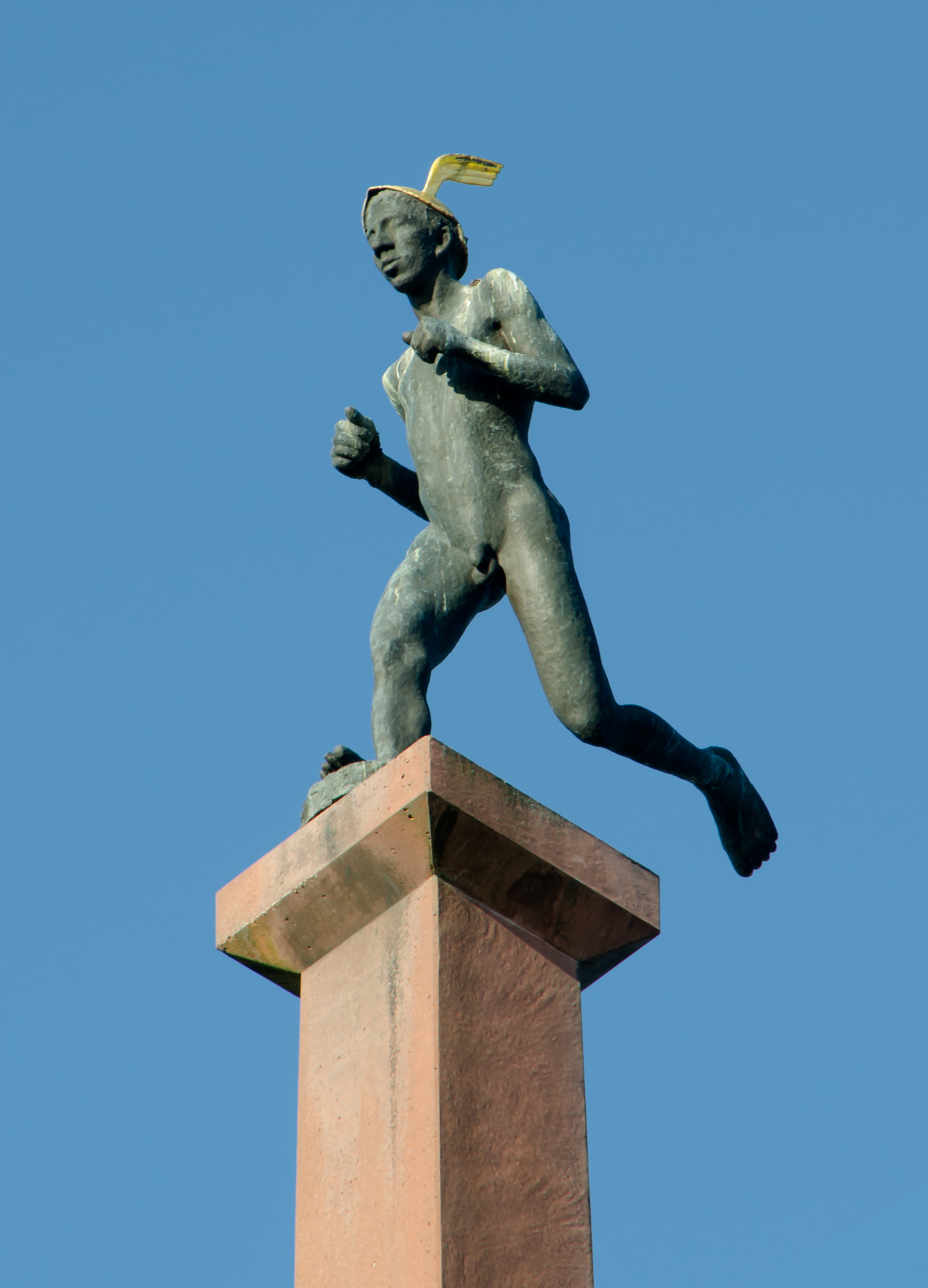 Merkursäule (1993) des deutschen Bildhauers Bernd Stöcker, Merkurpark, Merkurring in Hamburg-Rahlstedt.